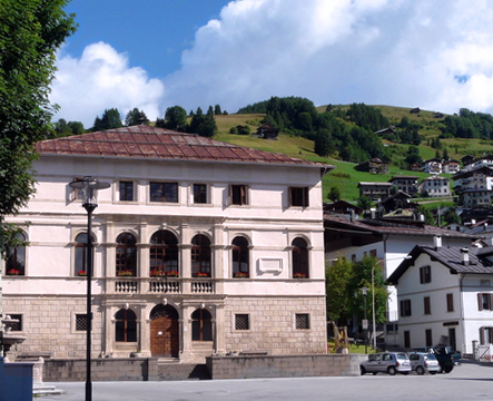 Palazzo Poli-De Pol (sec. XVII)